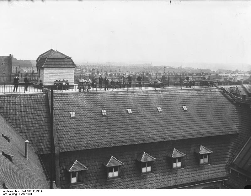 Der grösste Dachgarten Berlins! Blick auf den Dachgarten der Osram-Werke in Berlin, welcher den Angestellten in ihren Frühstückspausen zur Erholung dient.